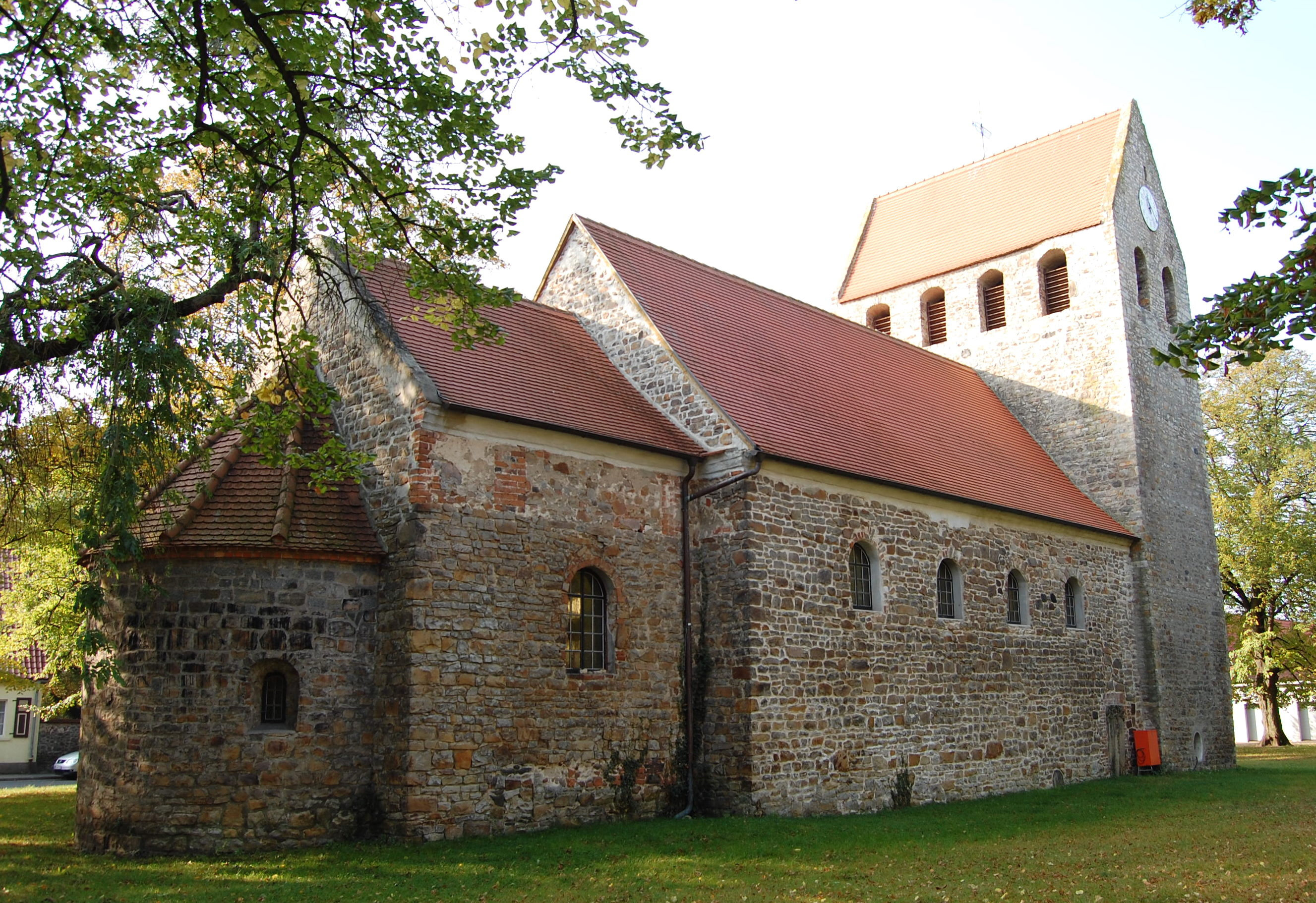 Sankt-Nicolai-Kirche in Nedlitz